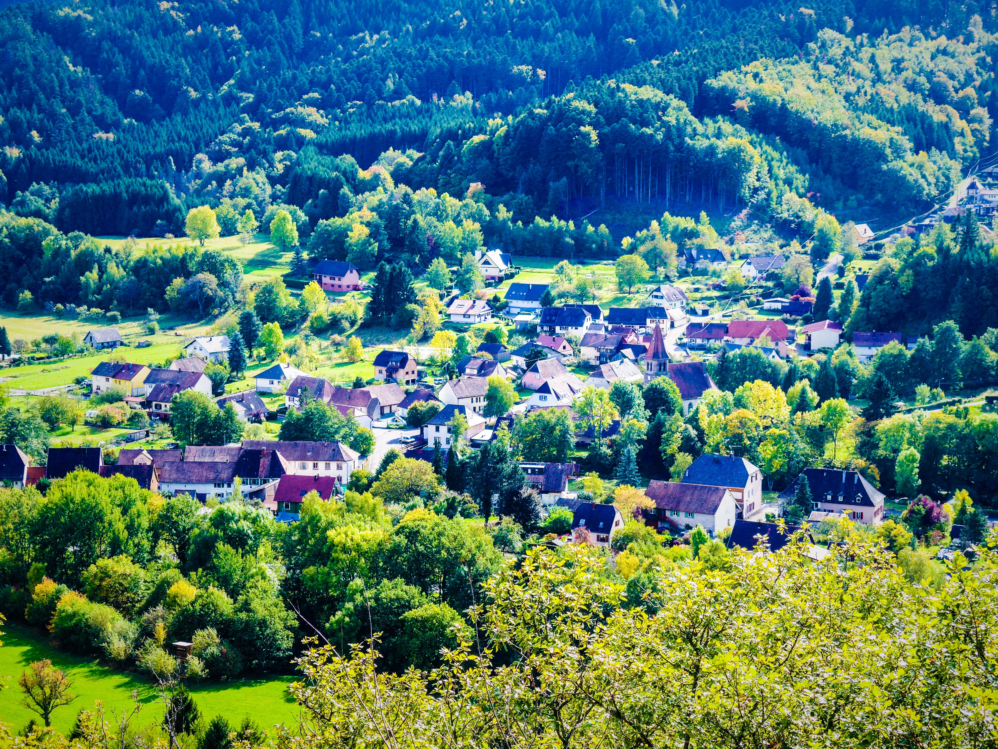 Panorama sur le village de Niederbruck, depuis le pied de la statue de la Vierge d'Alsace. Haut-Rhin.